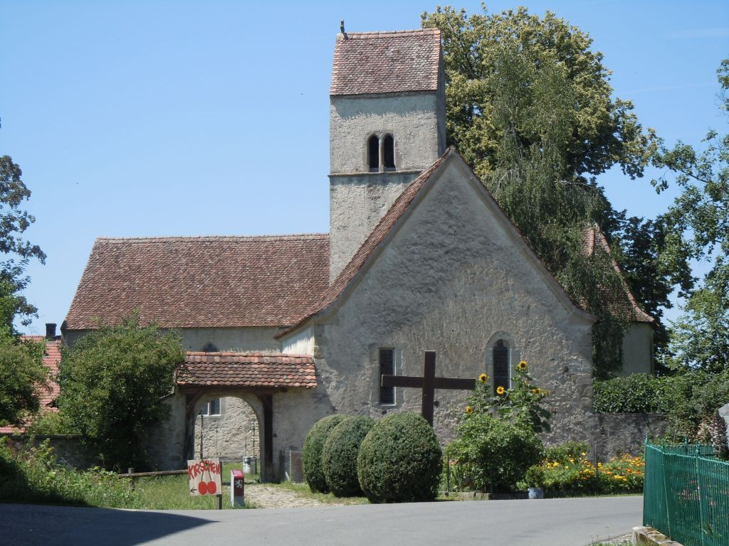 Kirchbühl (Sempach): Kirche St. Martin mit Beinhaus